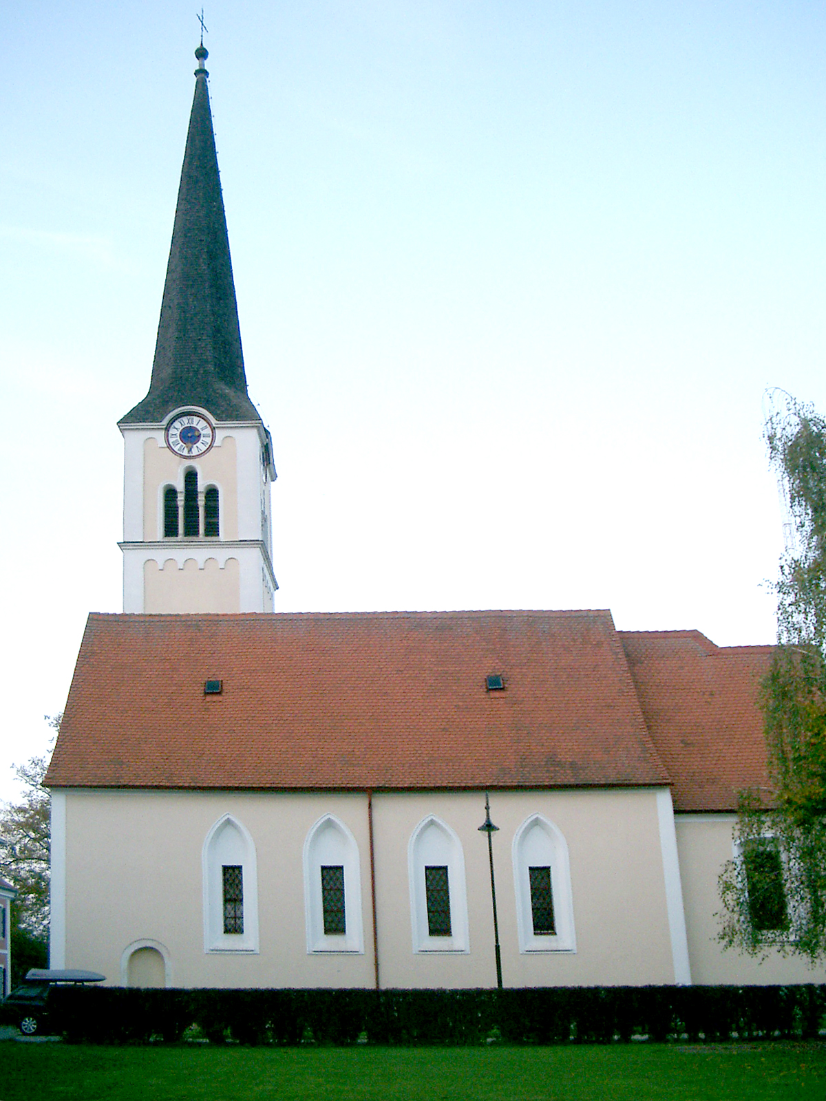 Kath. Pfarrkirche hl. Maria in Dorn und ehem. Friedhof